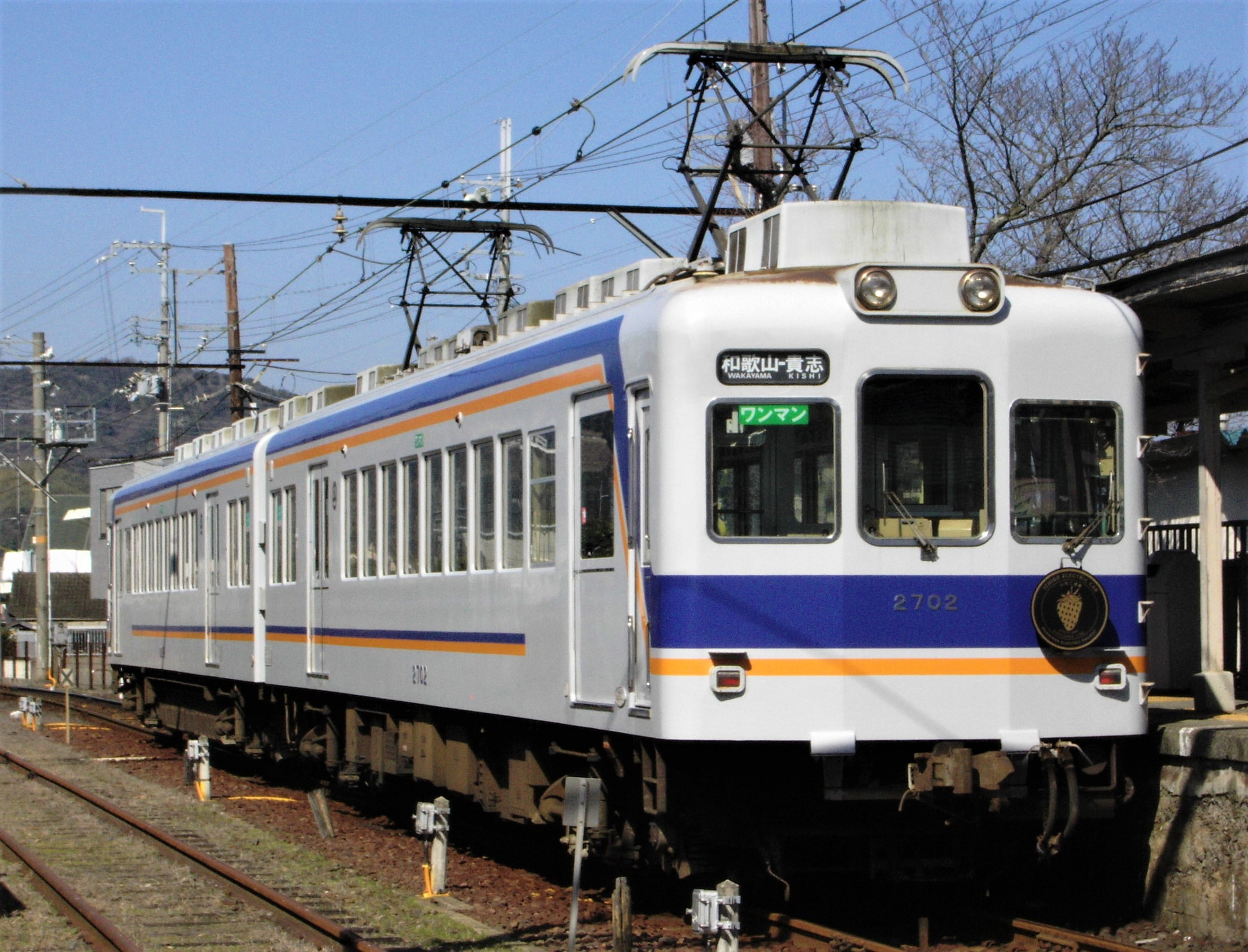 貴志駅にて撮影